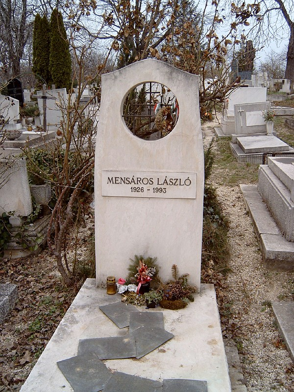 Mensáros László (1926-1993) sírja Budapesten. A sírkőbe vágott körben három vaskereszt van, a sírfedélen lévő mészkőlapokon William Shakespeare, Lev Tolsztoj, Arany János, Leonardo da Vinci, Federico Fellini, Weöres Sándor és Babits Mihály idézetek vannak. Az absztrakt mű Kampfl József 1996-os alkotása. Forrás: [1] Farkasréti temető: 25-5-16/1.